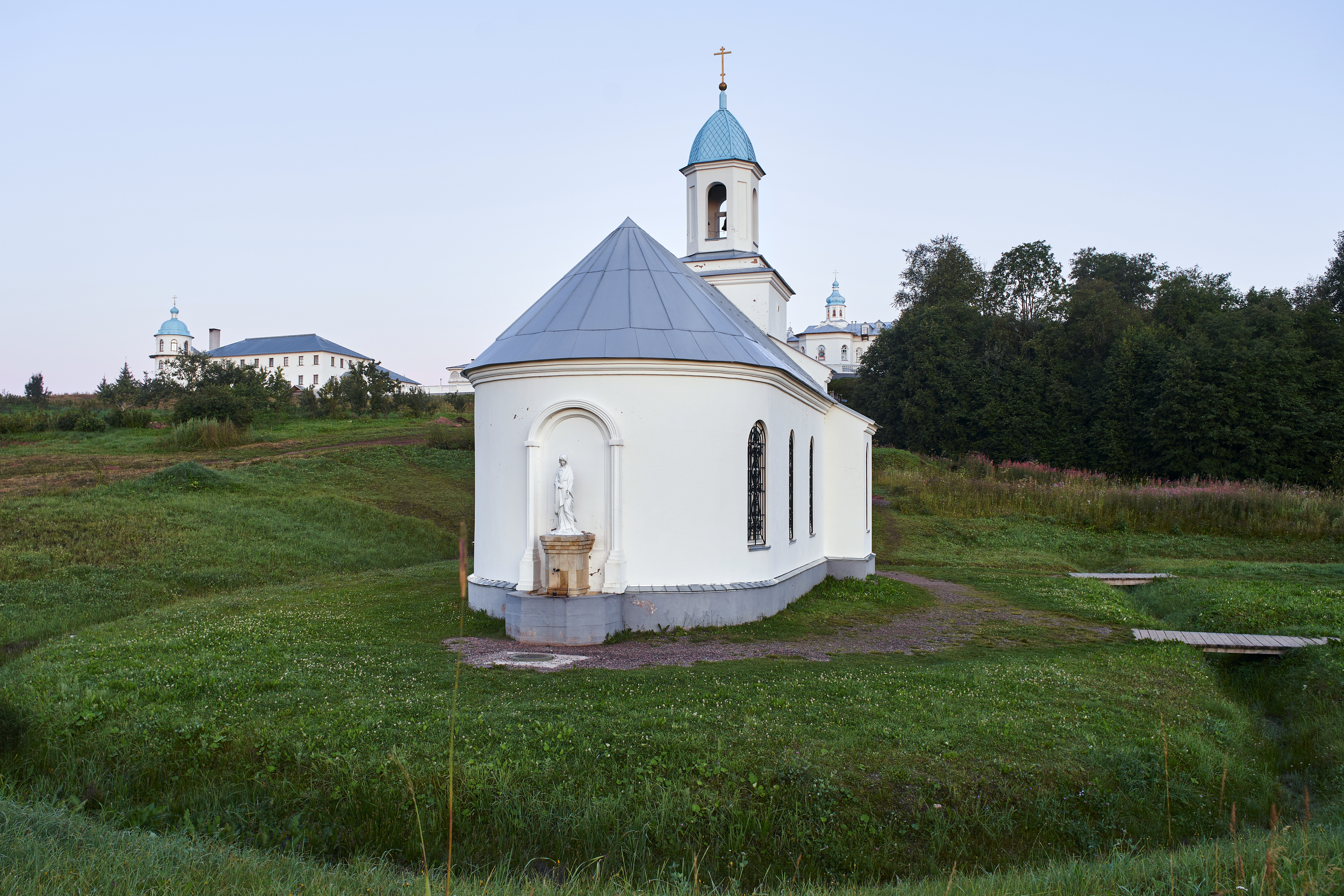 Покровский Тервенический женский монастырь. Село Тервиничи Тихвинского района ЛО.